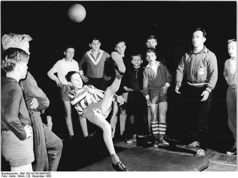 Zentralbild-Kohls 28.12.1962 Zum VI. Parteitag der SED: Fußballer des SC auf vorbildlichem Weg Ein Arbeitsprogramm zum VI. Parteitag, dessen Erfüllung der Dank des Kollektivs an die Partei für die erwiesene Unterstützung sein soll, haben die Fußballer des TSC Oberschöneweide beschlossen. Darin verpflichten sich Spieler und Funktionäre unter anderem, alle zum VI. Parteitag herausgegebenen Dokumente zu studieren und in Seminaren strittige Fragen zu behandeln. Die älteren und leistungsstarken Spieler wollen in Zukunft den jüngeren helfen, das Niveau der Besten zu erreichen. Die Sportfreunde Grunst und Uhden übernehmen das Training der Knaben- und Schülermannschaften. Weiterhin ist beabsichtigt, mit den Frauen Theateraufführungen zu besuchen und die freundschaftlichen Kontakte mit dem Maxim-Gorki-Theater zu erweitern. UBz: Ein Fallrückzieher will gerlent sein! Dietwald Grunst und "seine" Schüler beim Hallentraining.